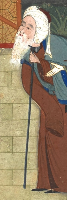 Vermutetes Porträt des Dichters Dschāmi; Ausschnitt aus einer Illustration zu Nizamis Khamsah